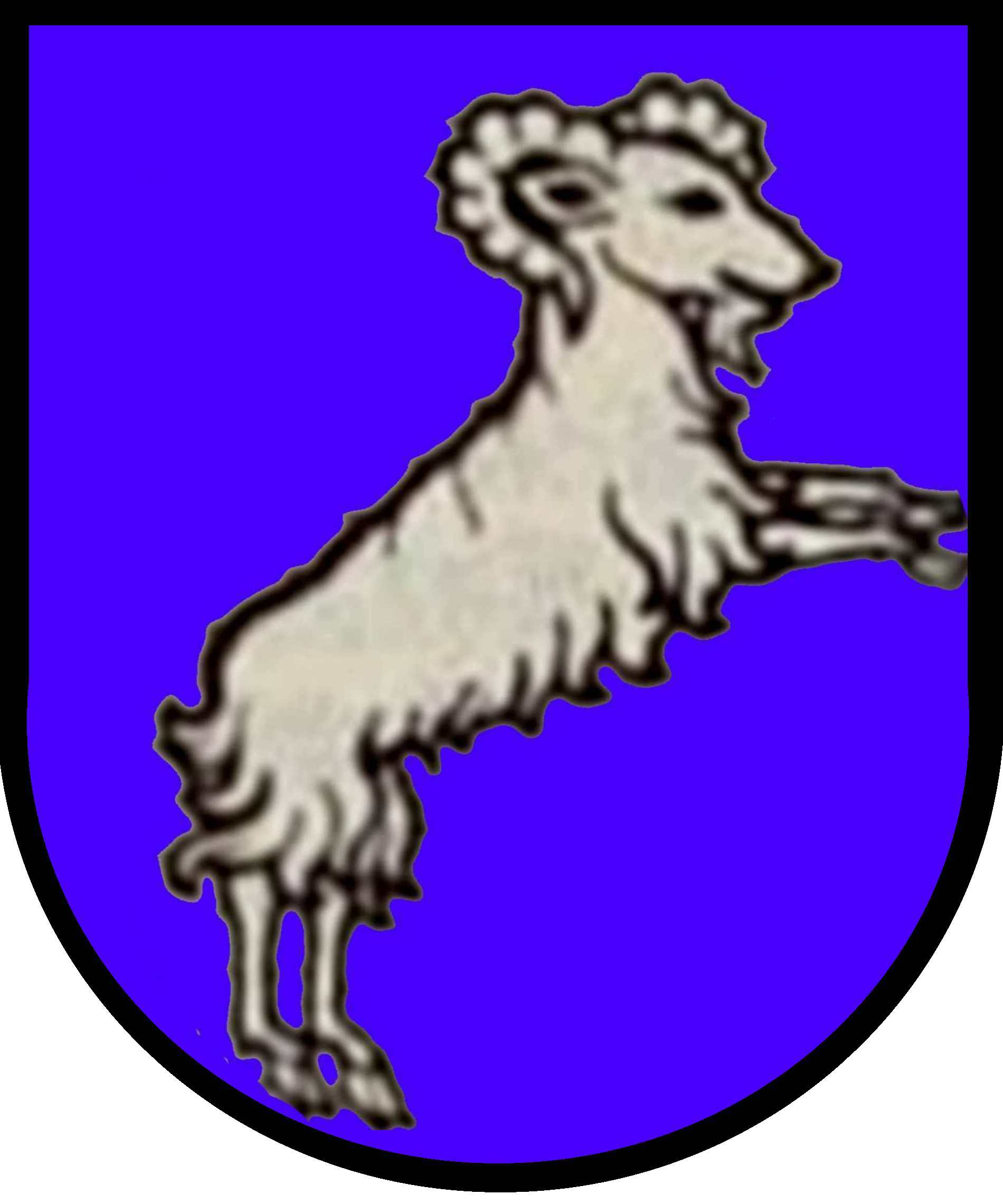 Familienwappen Valär (von Fideris) Blasonierung: In Blau gewendeter, steigender, silberner Widder.